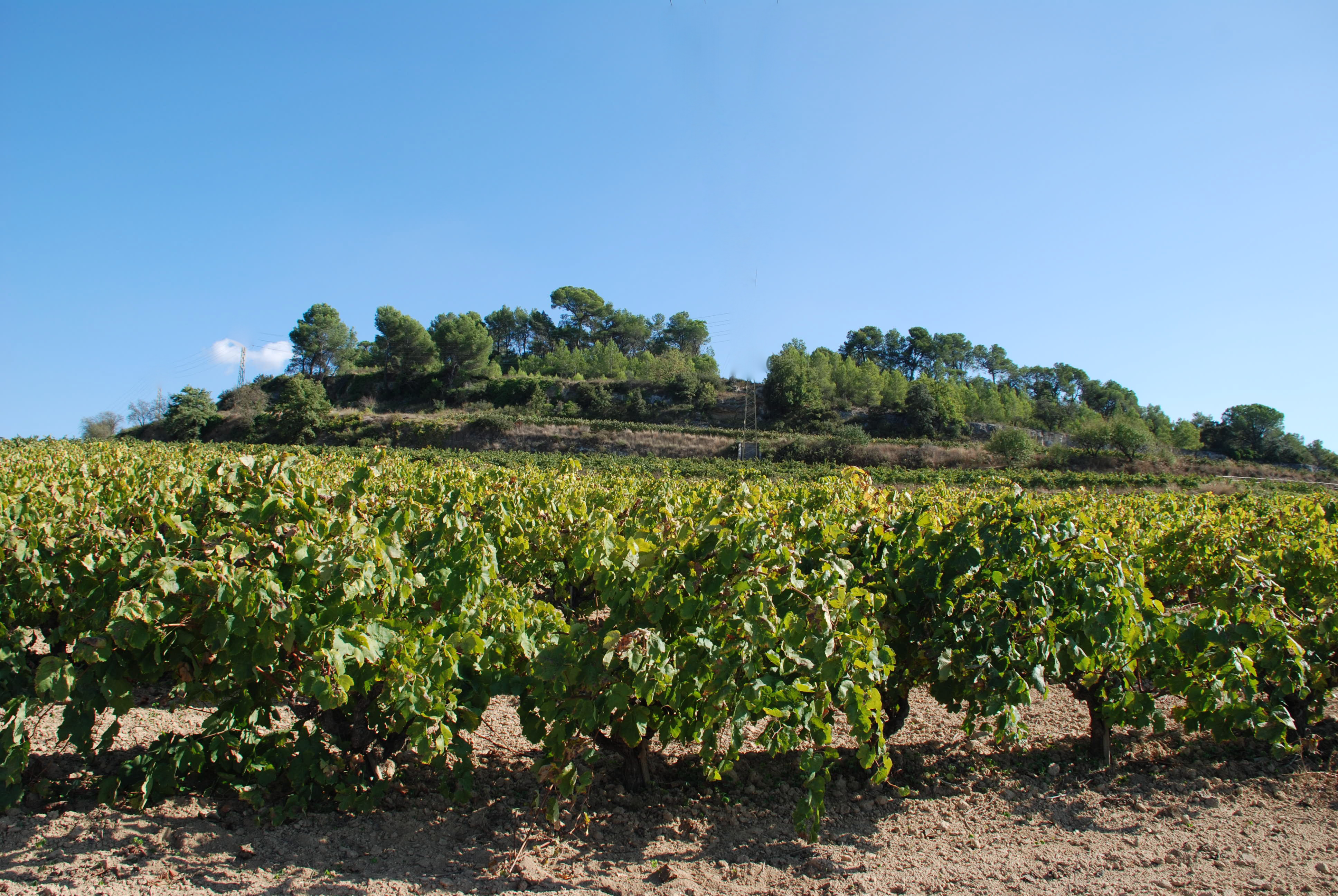 Serral de Lavern (Catalonia), Pertany a la Serralada Litoral i és una prolongació de les Serres de l'Ordal, al municipi de Subirats